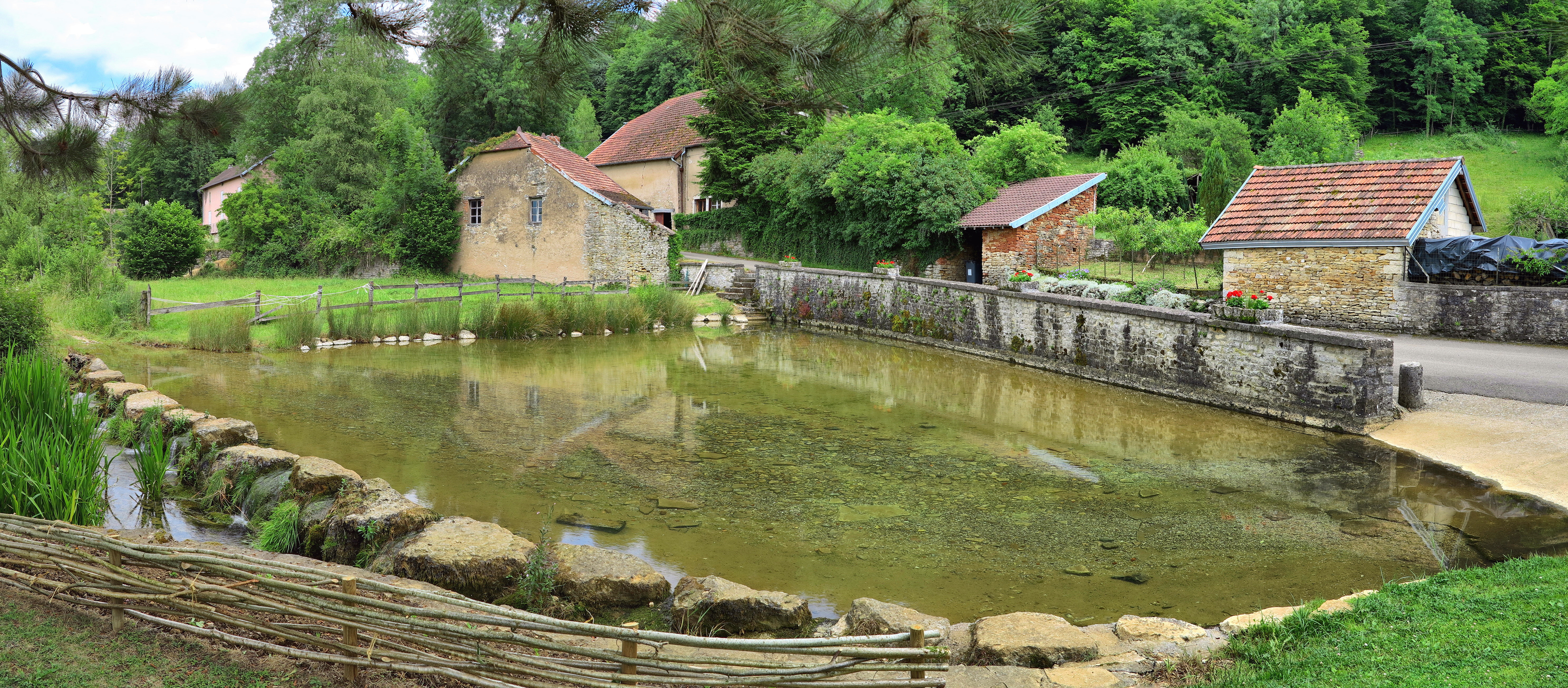 La source et son bassin